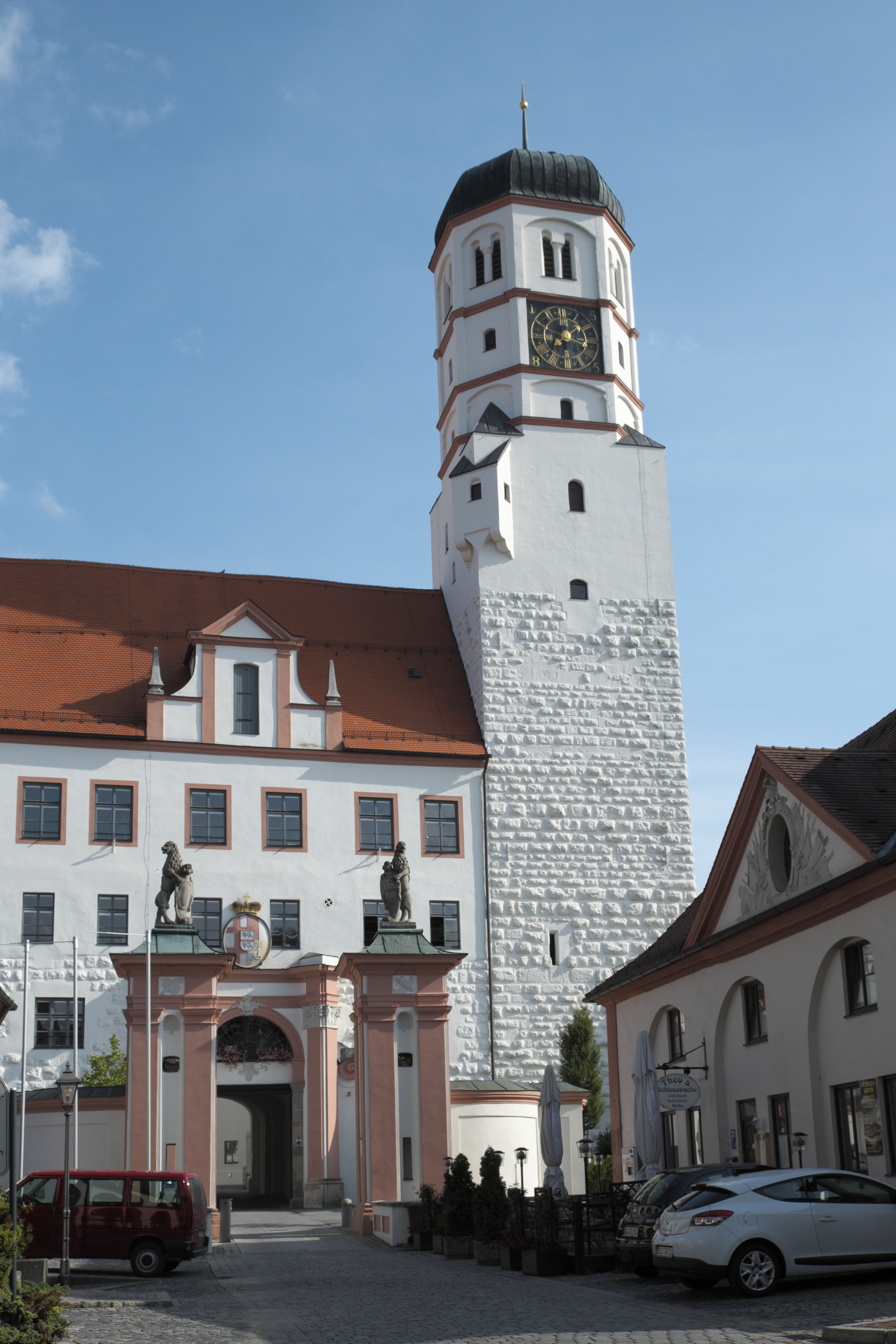 Schloss in Dillingen an der Donau (Bayern), Ansicht von Norden